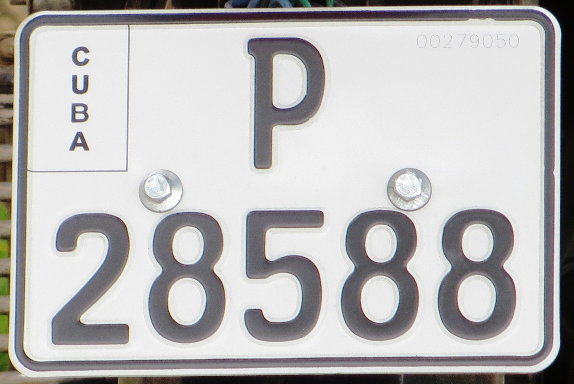 Kentekenplaat van Cuba